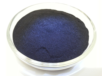 {tris(dibenzylideneacetone)dipalladium(0) ,Pd2(dba)3